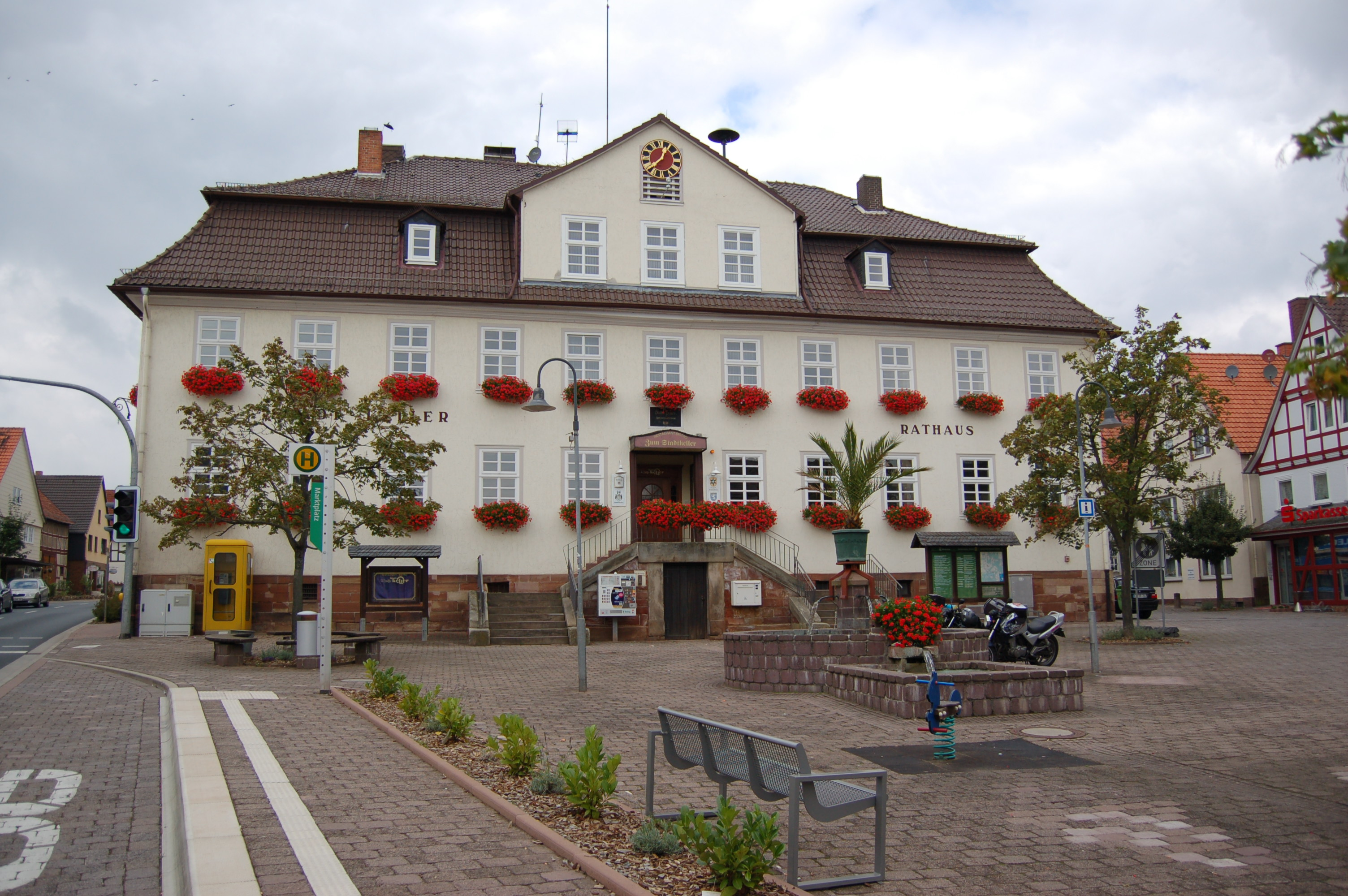 townhall in Sachsenhausen (Waldeck)